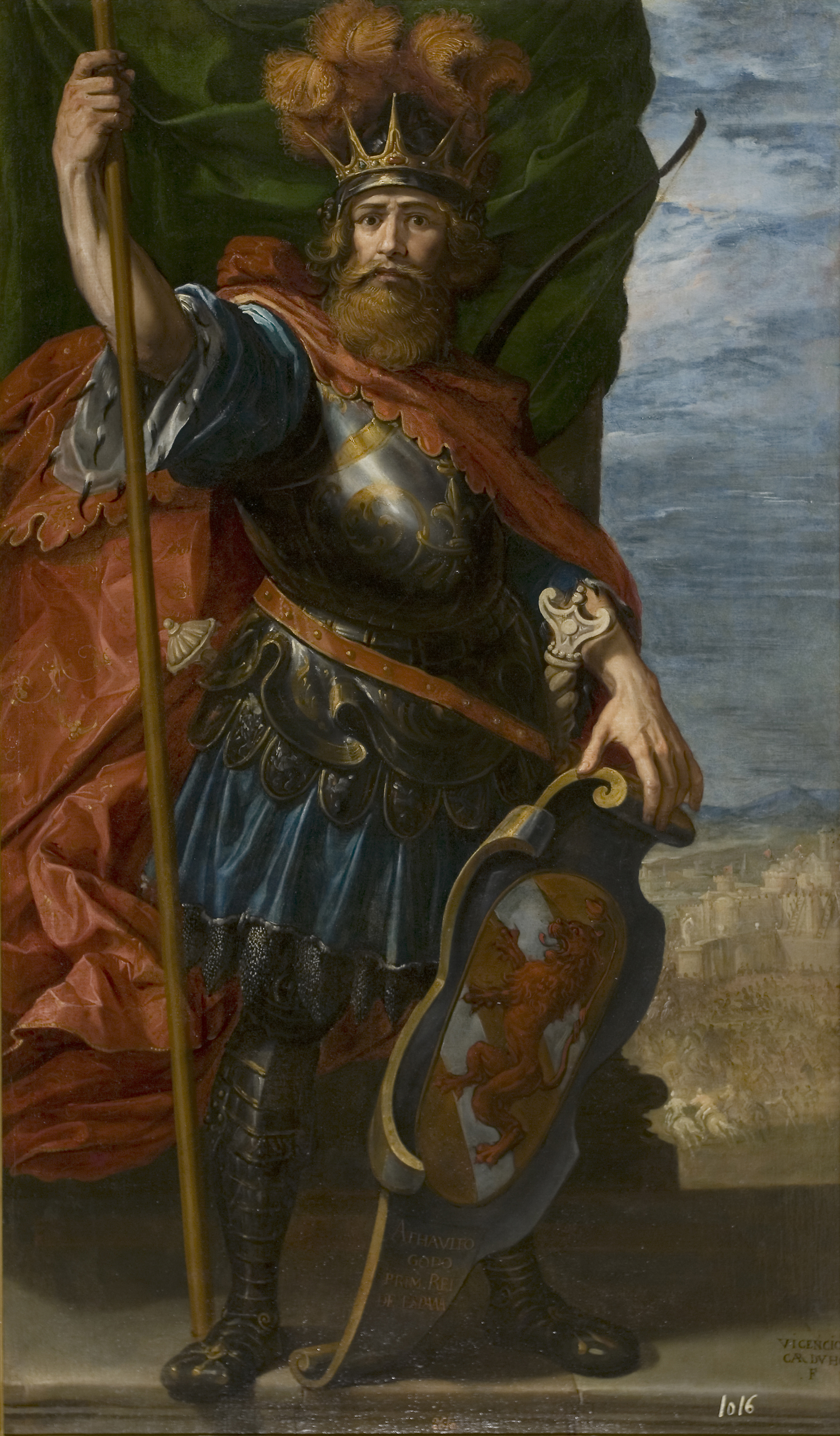 Vicente Carducho, "Ataúlfo, rey godo", 1634 - 1635